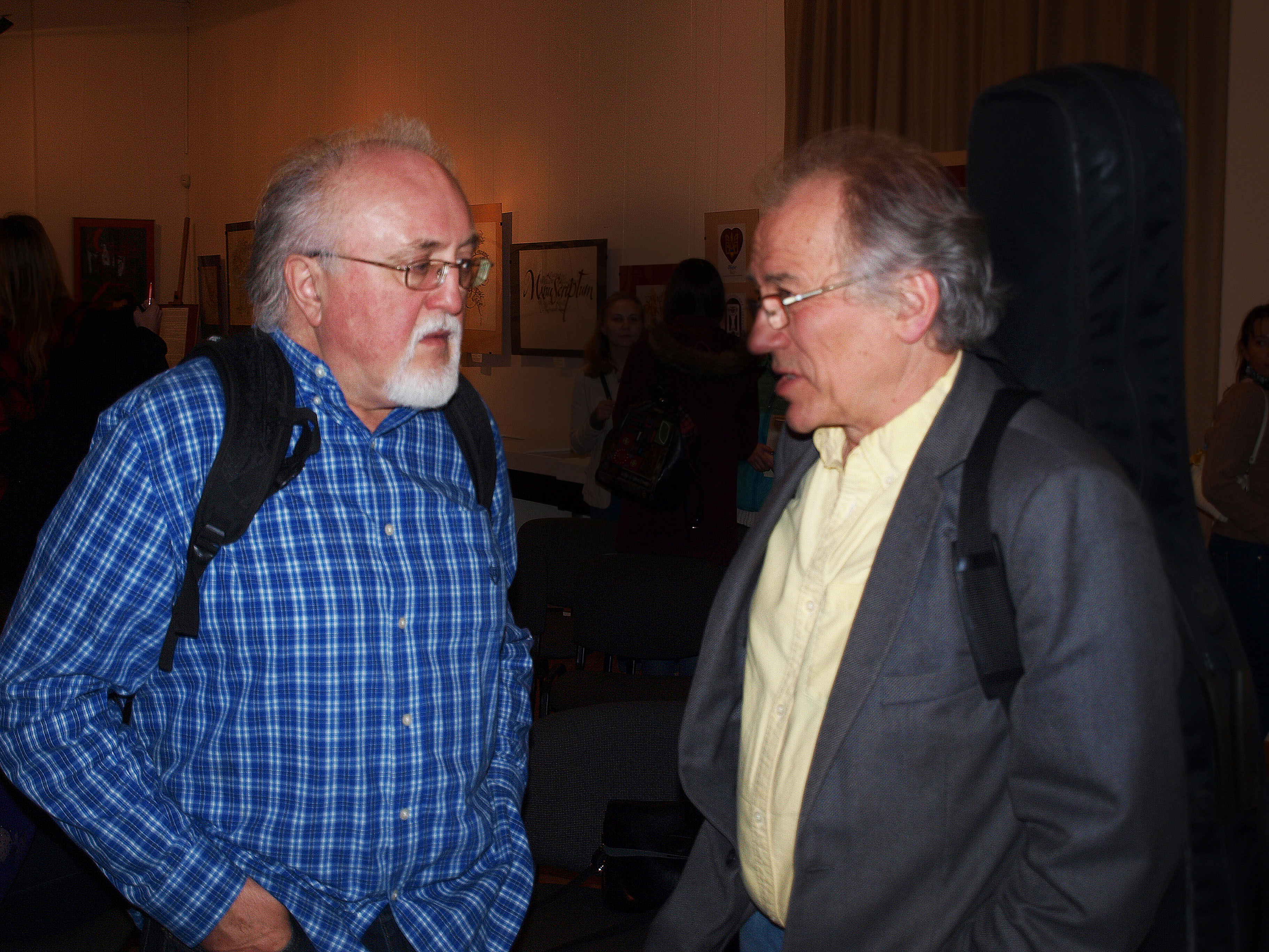 Юрій Винничук і Віктор Морозов (праворуч). Музей книги та друкарства України (Київ).